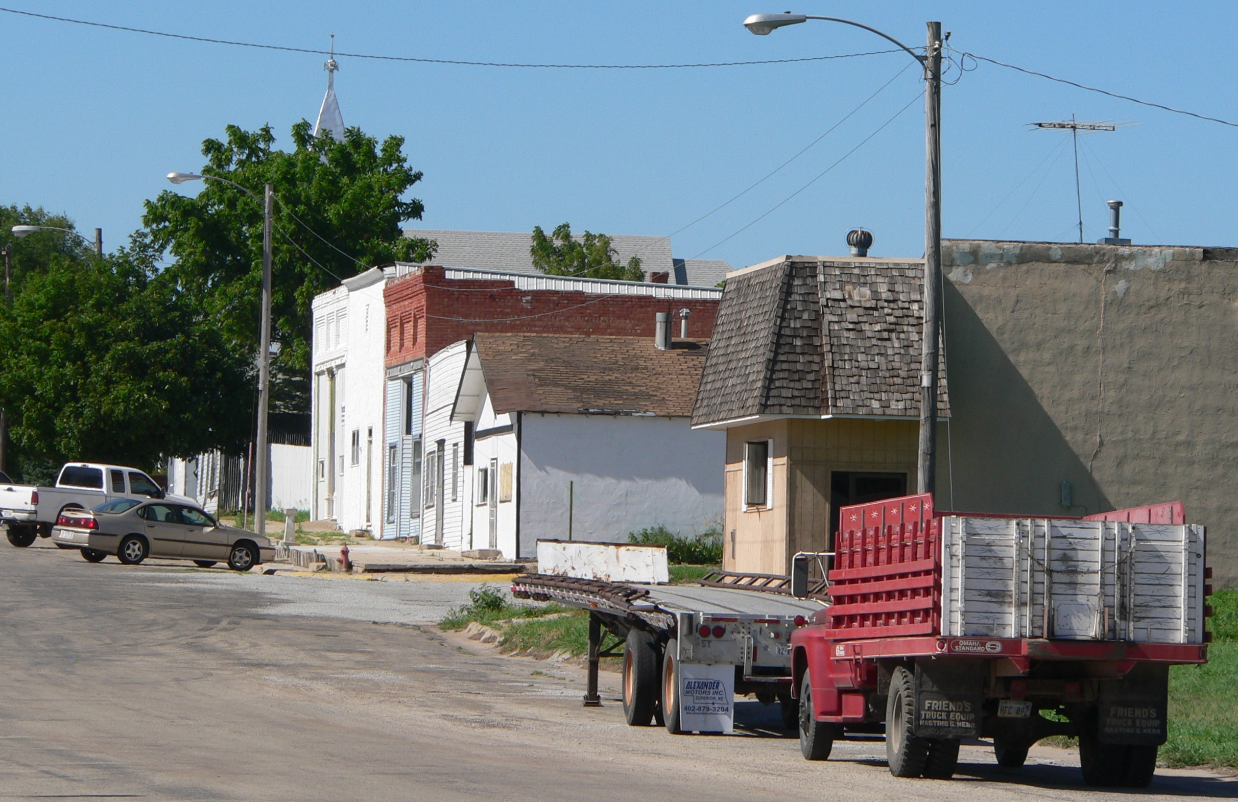 Downtown Hardy, Nebraska.